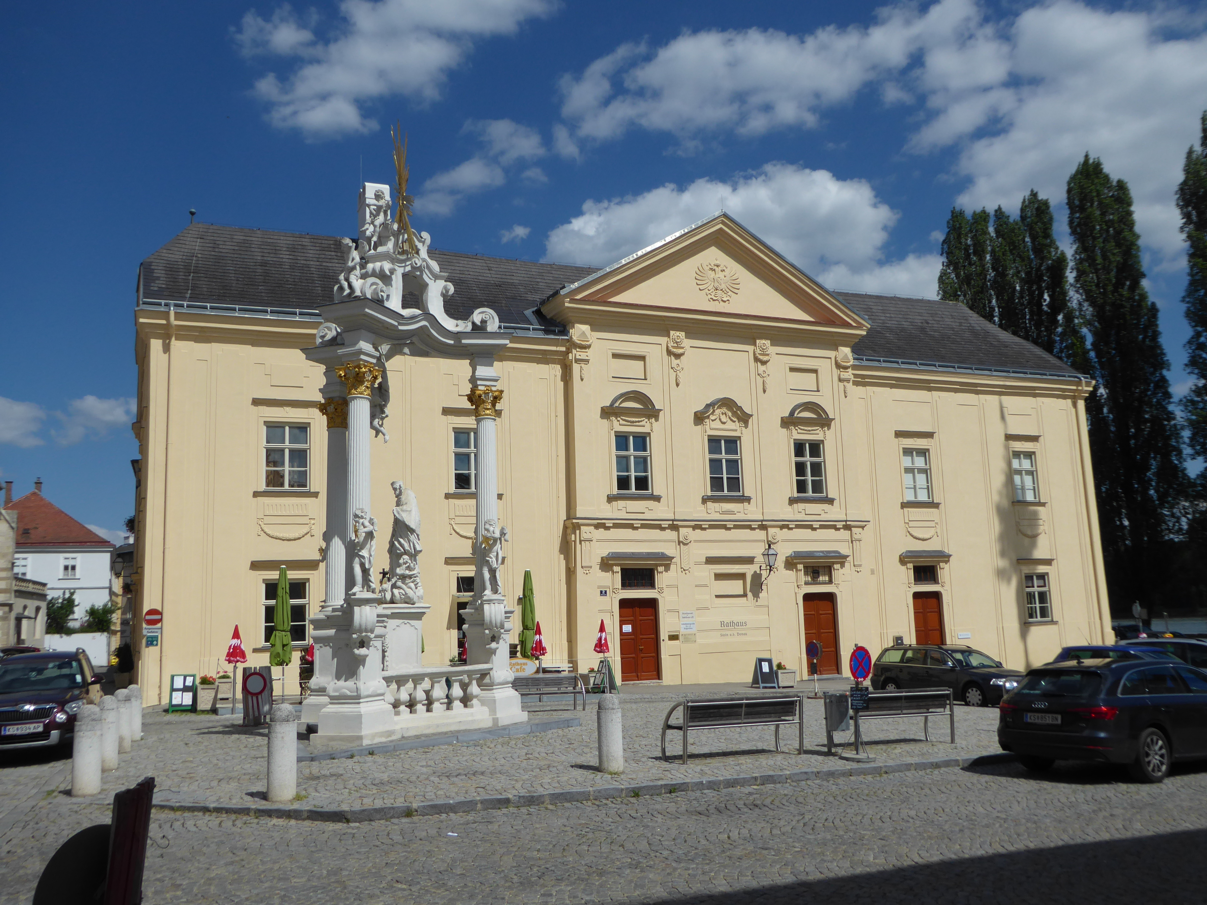 Rathaus, Rathausplatz 2, Stein (Stadt Krems), Niederösterreich - nach einer Neufärbelung; Johannes Nepomuk-Denkmal